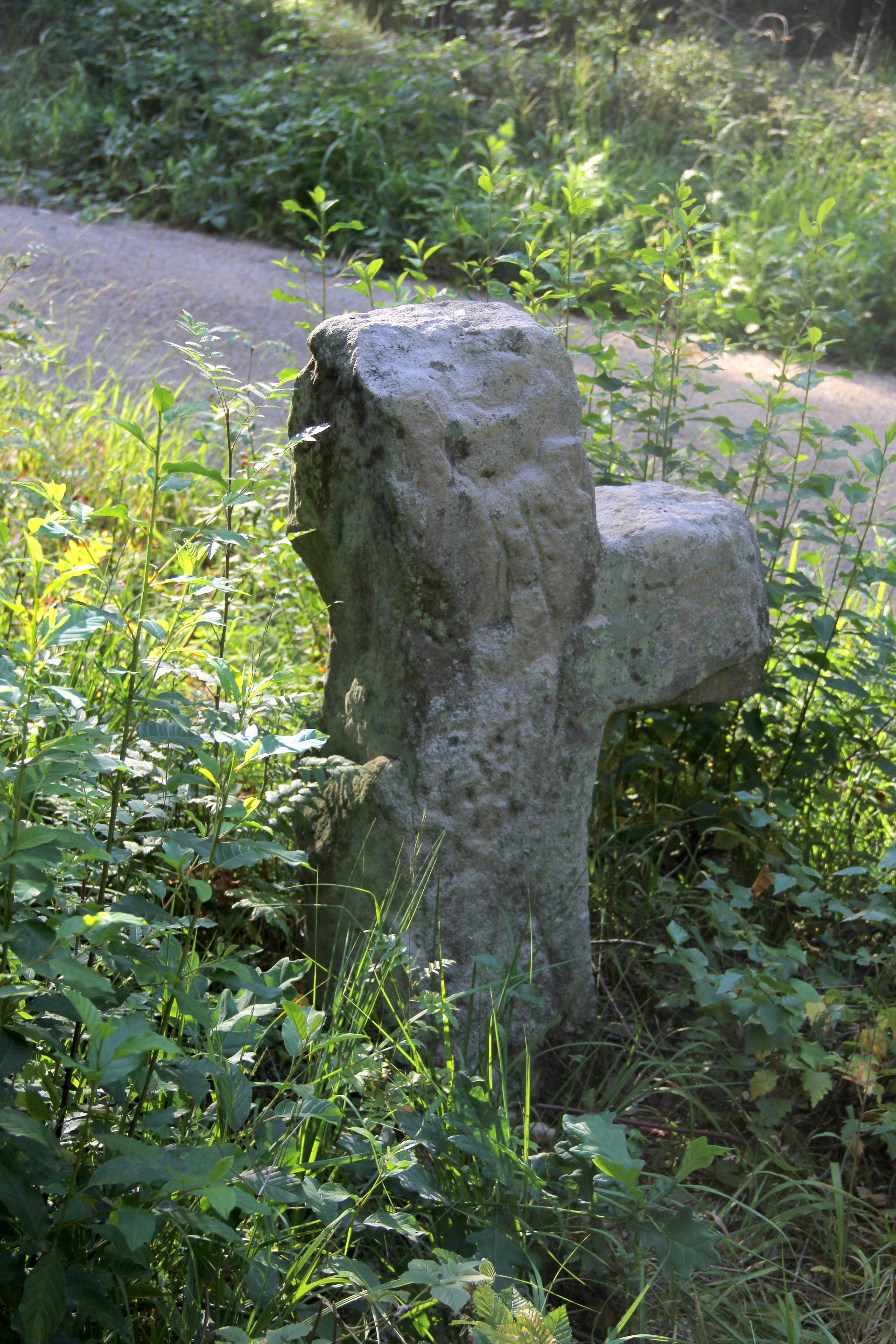 Steinkreuz